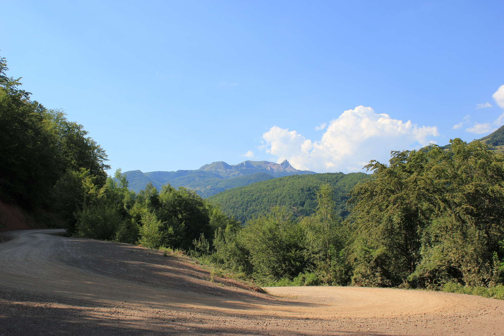 Die Passstraße Trnovo-Ustikolina bei Jabuka südlich des Jahorina-Gebirges, Bosnien und Herzegowina.Hornjoserbsce: Přesmykowa dróha wot Trnova do Ustikoliny blisko Jabuki južnje Jahoriny, Bosniska a Hercegowina.